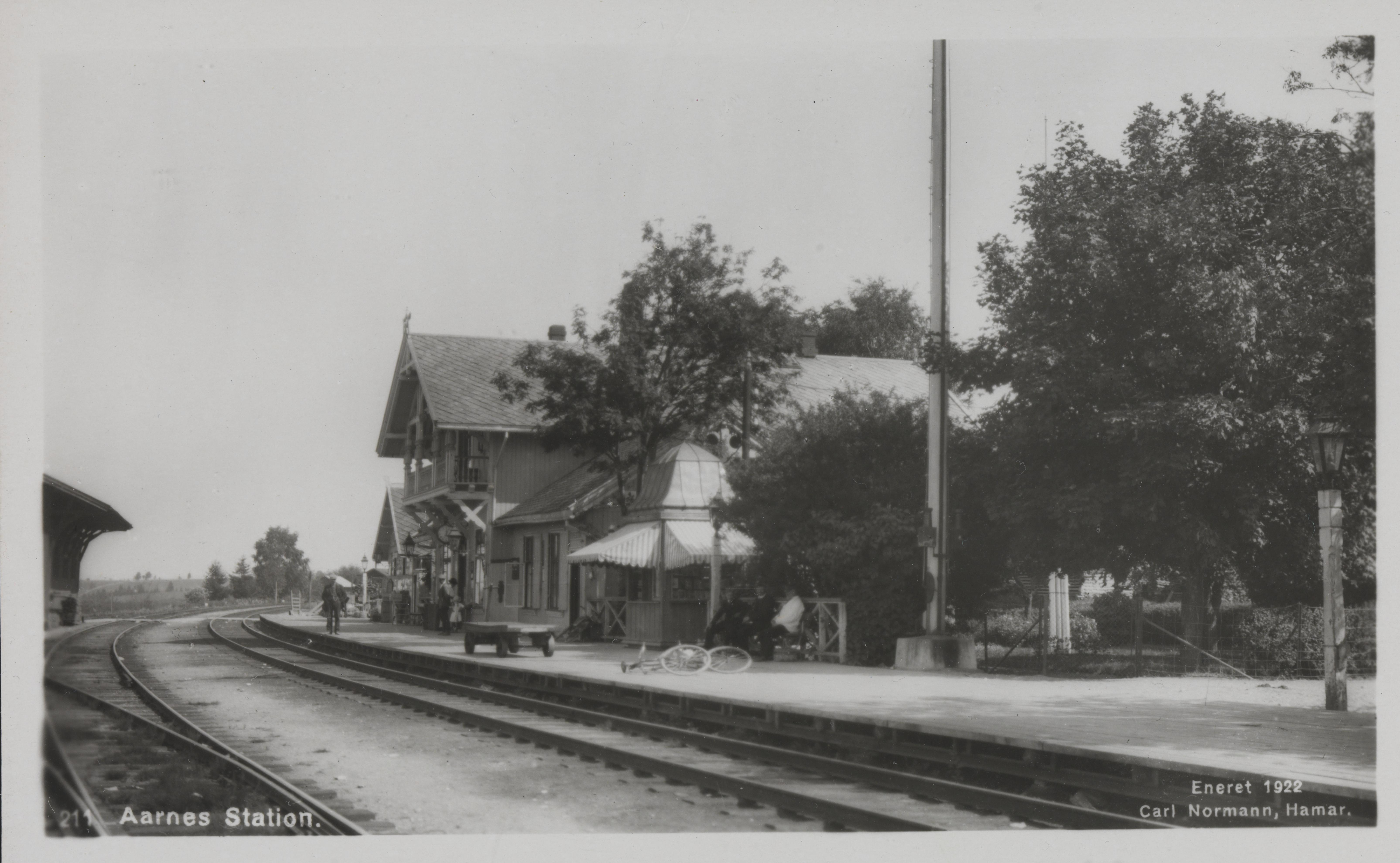 Bildet er hentet fra Nasjonalbibliotekets bildesamling Årnes,Årnes stasjon, Nes, Akershus